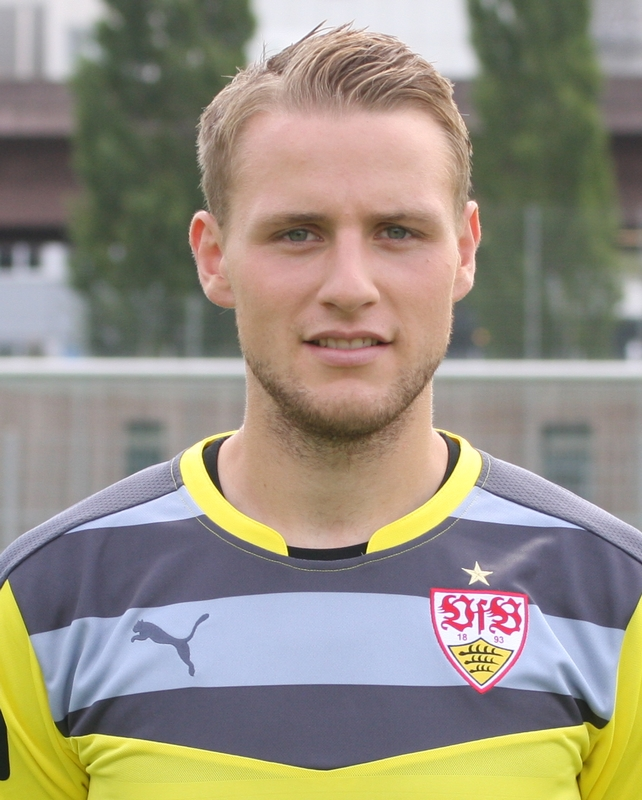 Marius Funk beim offiziellen Fotoshooting VfB II. Bild von